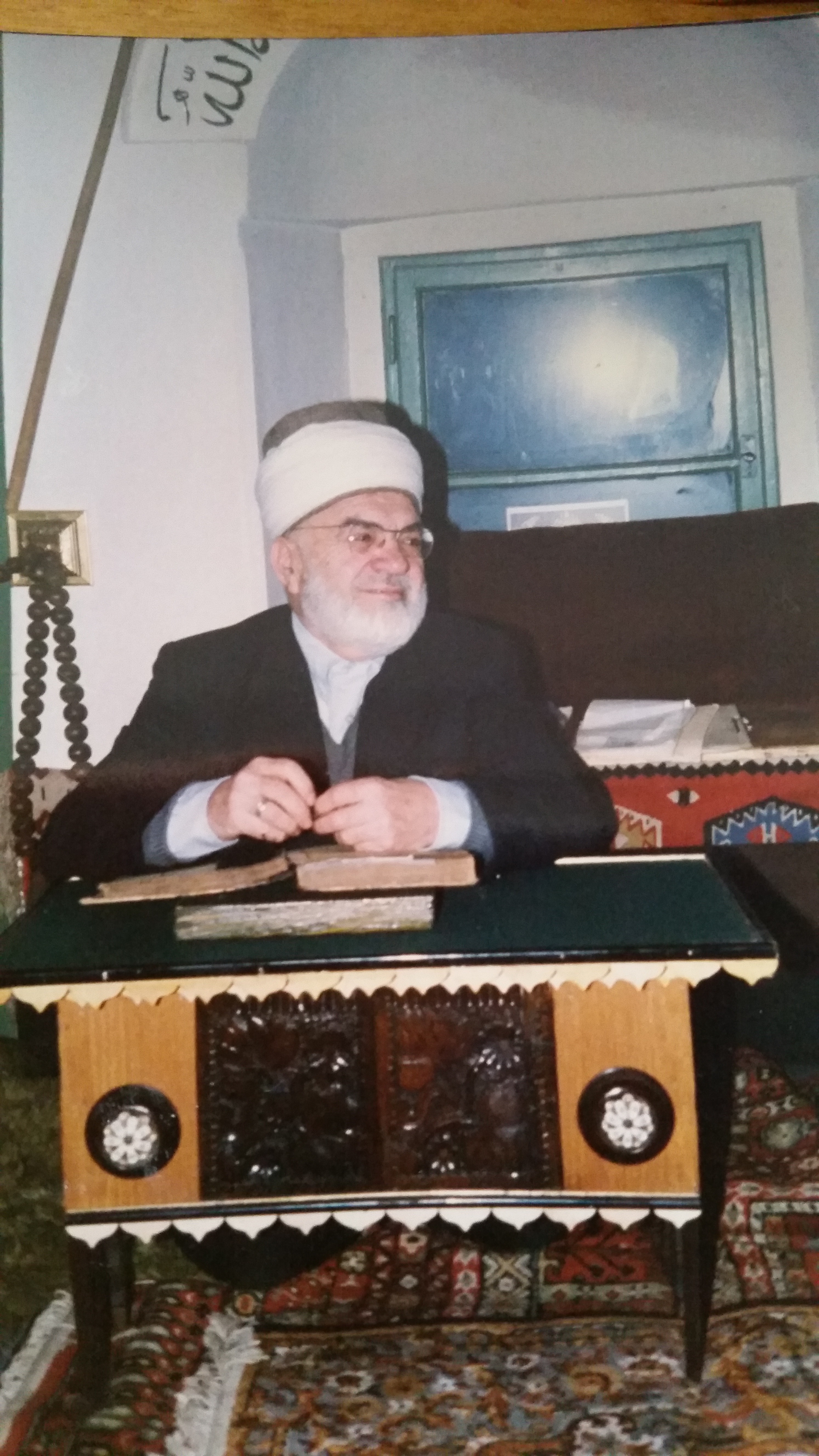 Fejzullah Hadžibajrić under Mesnevi-föreläsning